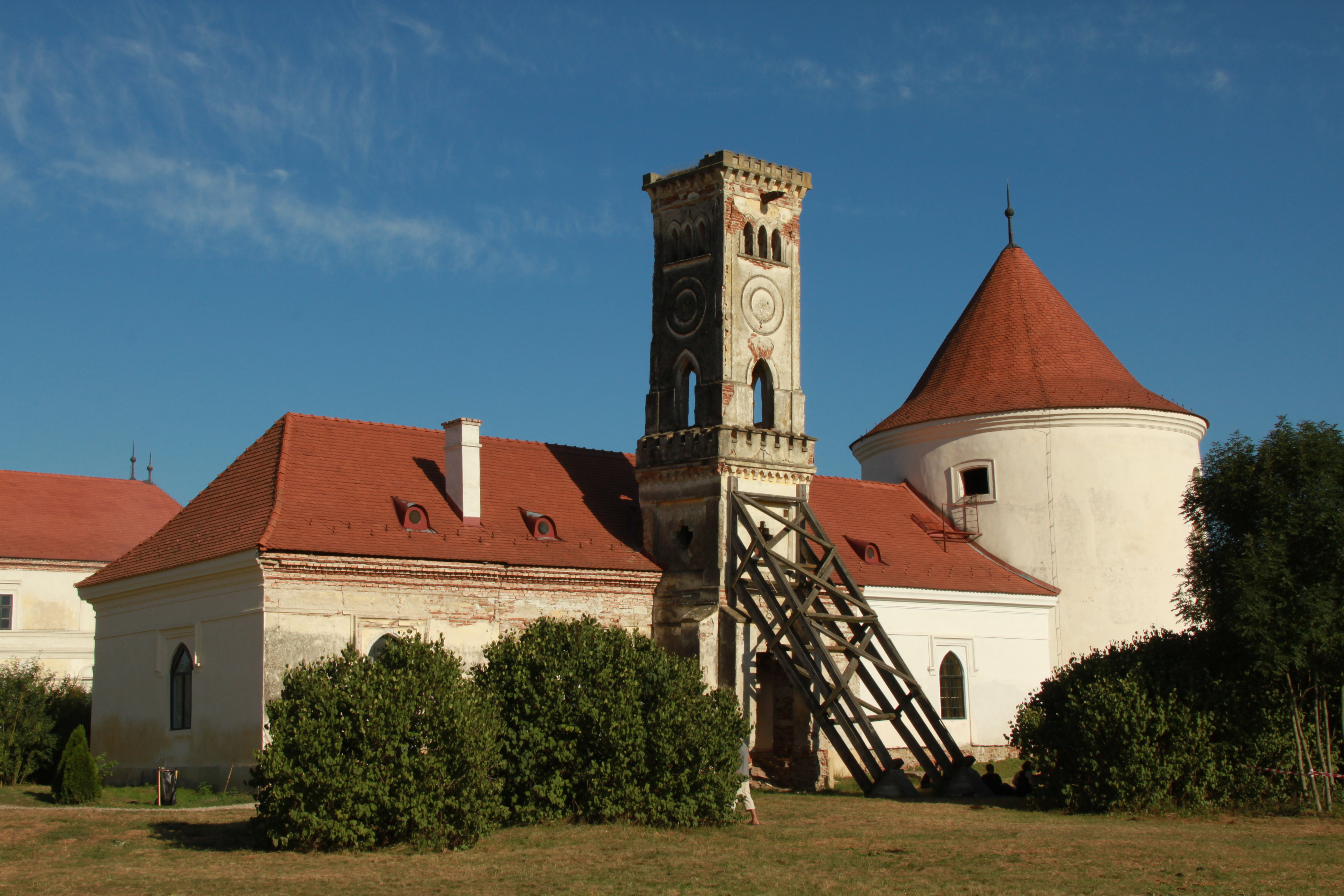 August 2011